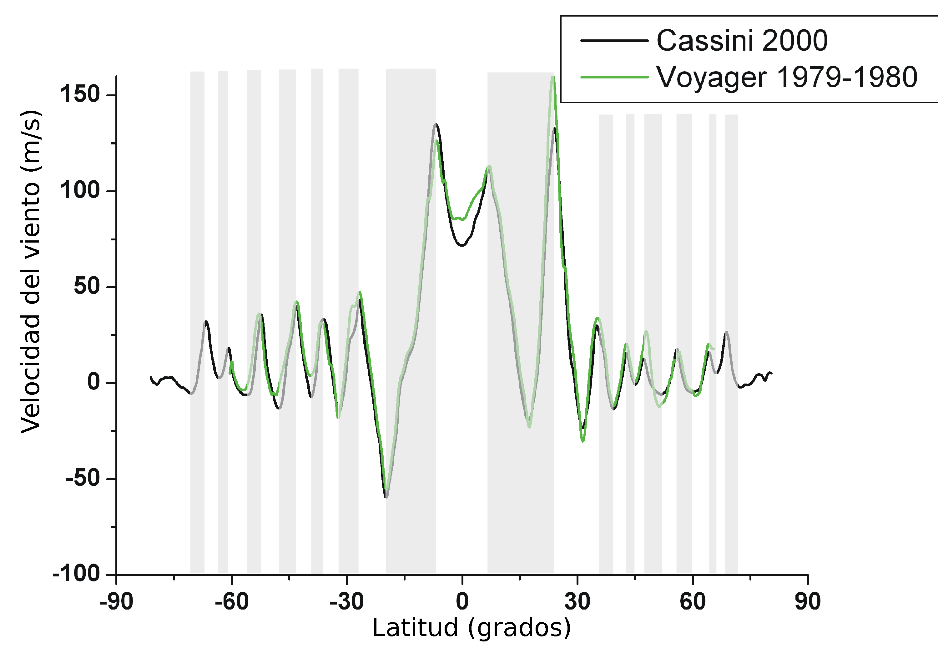 Wind speeds on Jupiter, legends in Spanish; velocidades del viento en Jupiter, texto en español